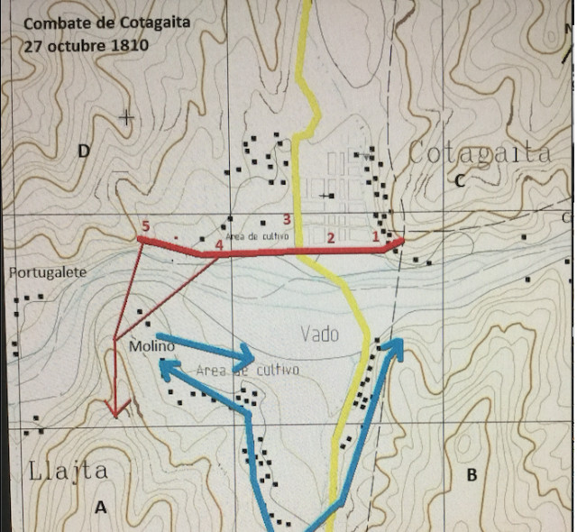 Batalla de Cotagaita (27/oct/1810). Rojo: vanguardia Ejercito Real Peru; Azul: Vanguardia Ejercito Auxiliar del Peru.